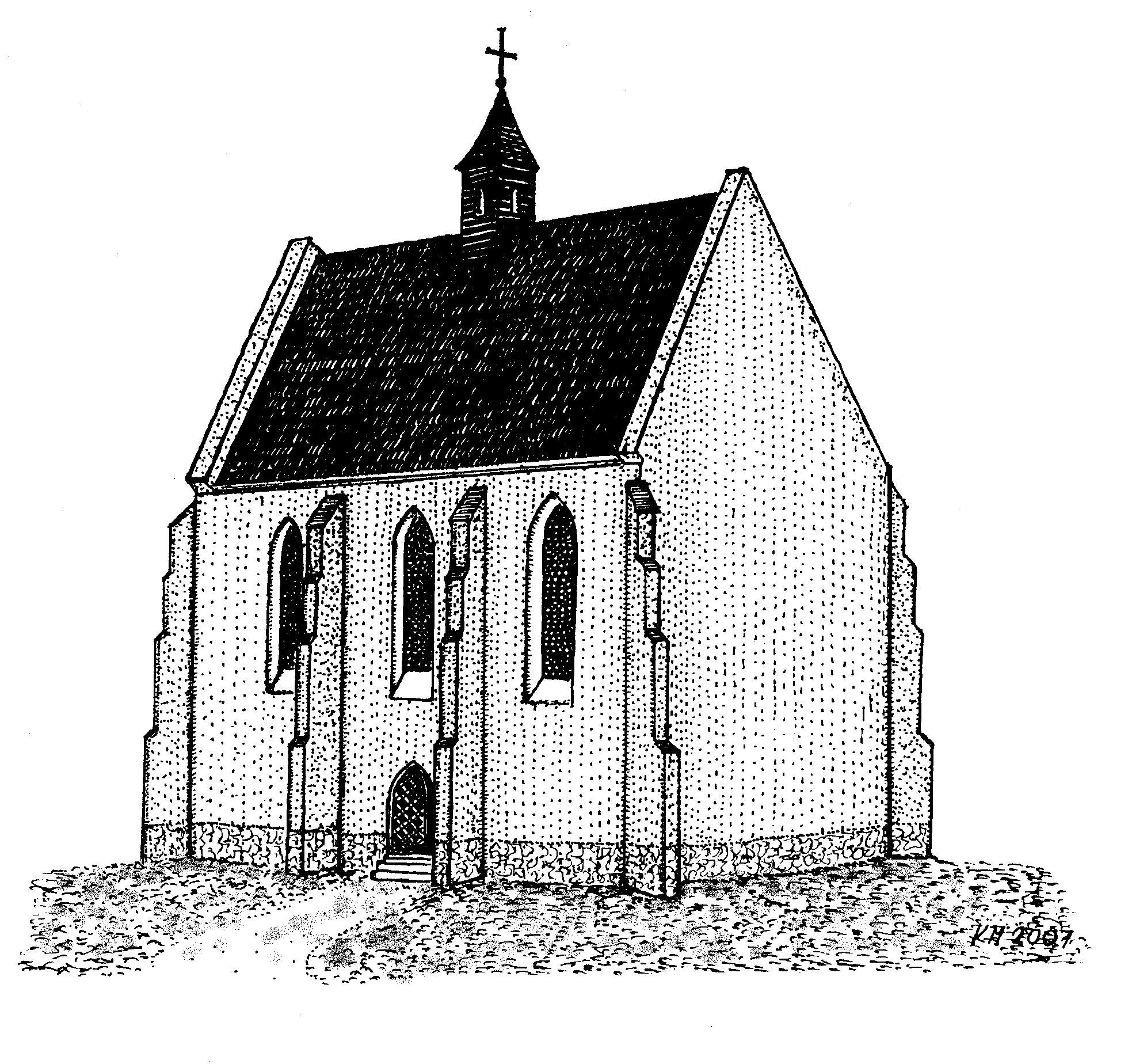 Kościół parafialny w Tarnowie ok. poł. XIV w. Rekonstrukcja teoretyczna